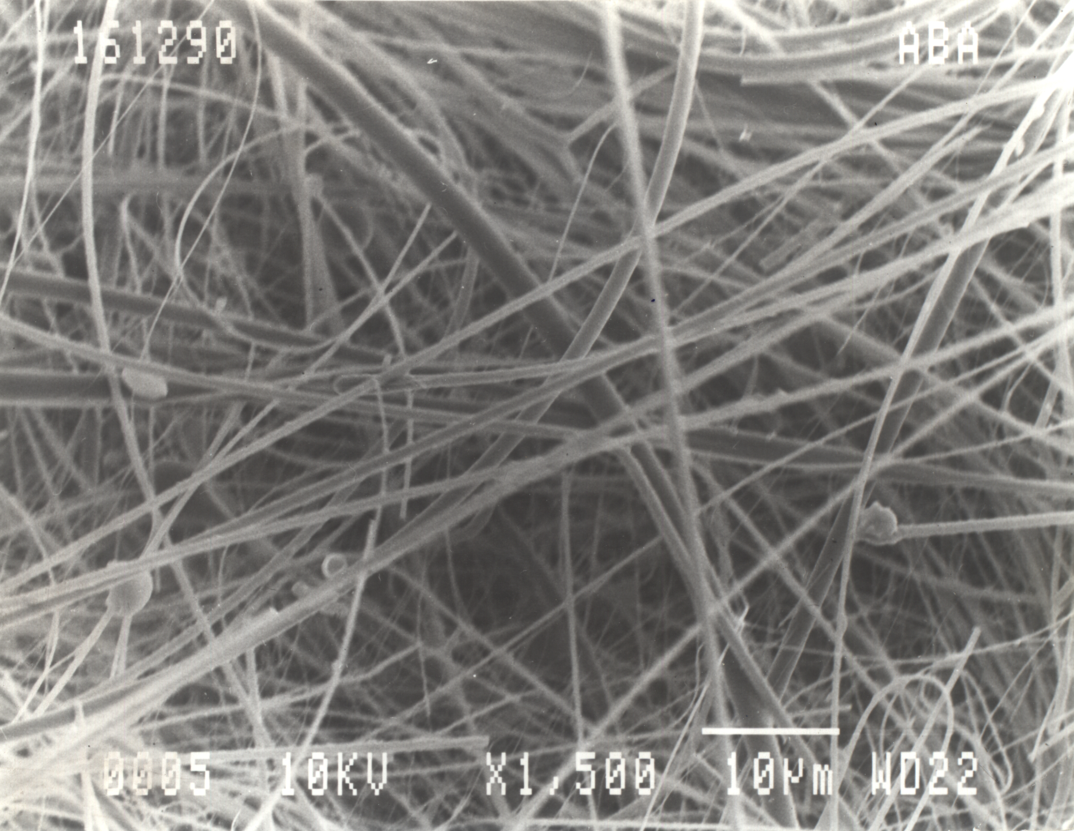 разрешен­ие OTRS|2012073110005081